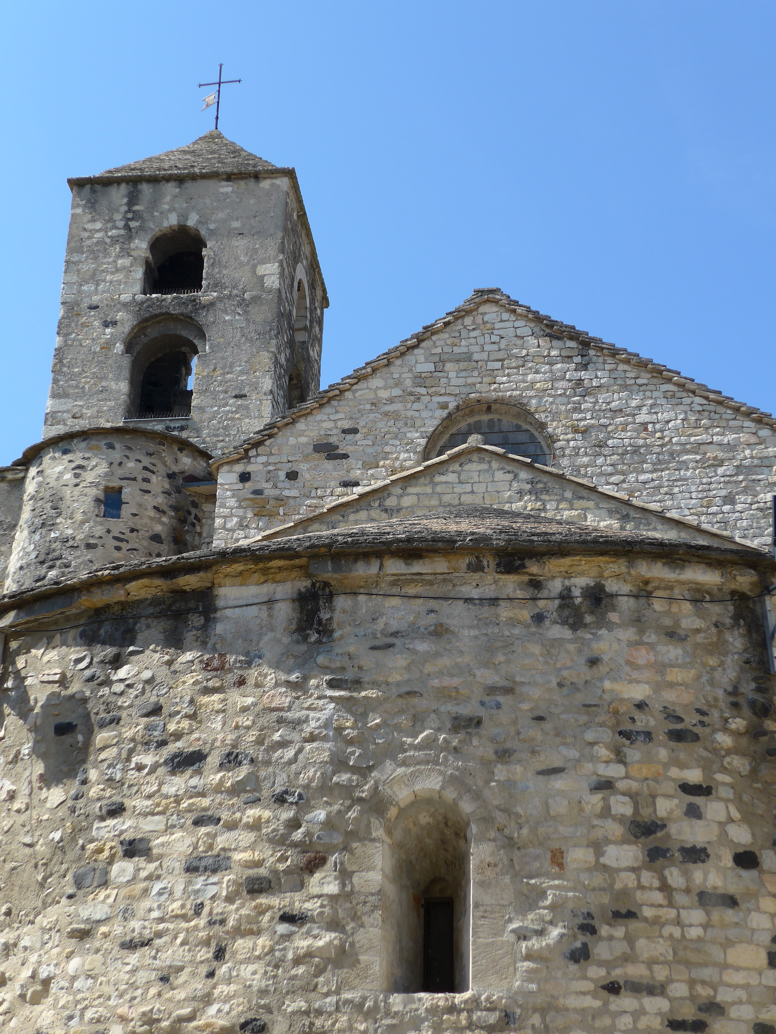 L'église St Jean Baptiste de Meysse (Ardèche) fut bâtie aux 5° et 6° siècles et remaniée tout au long des temps jusqu'à nos jours.